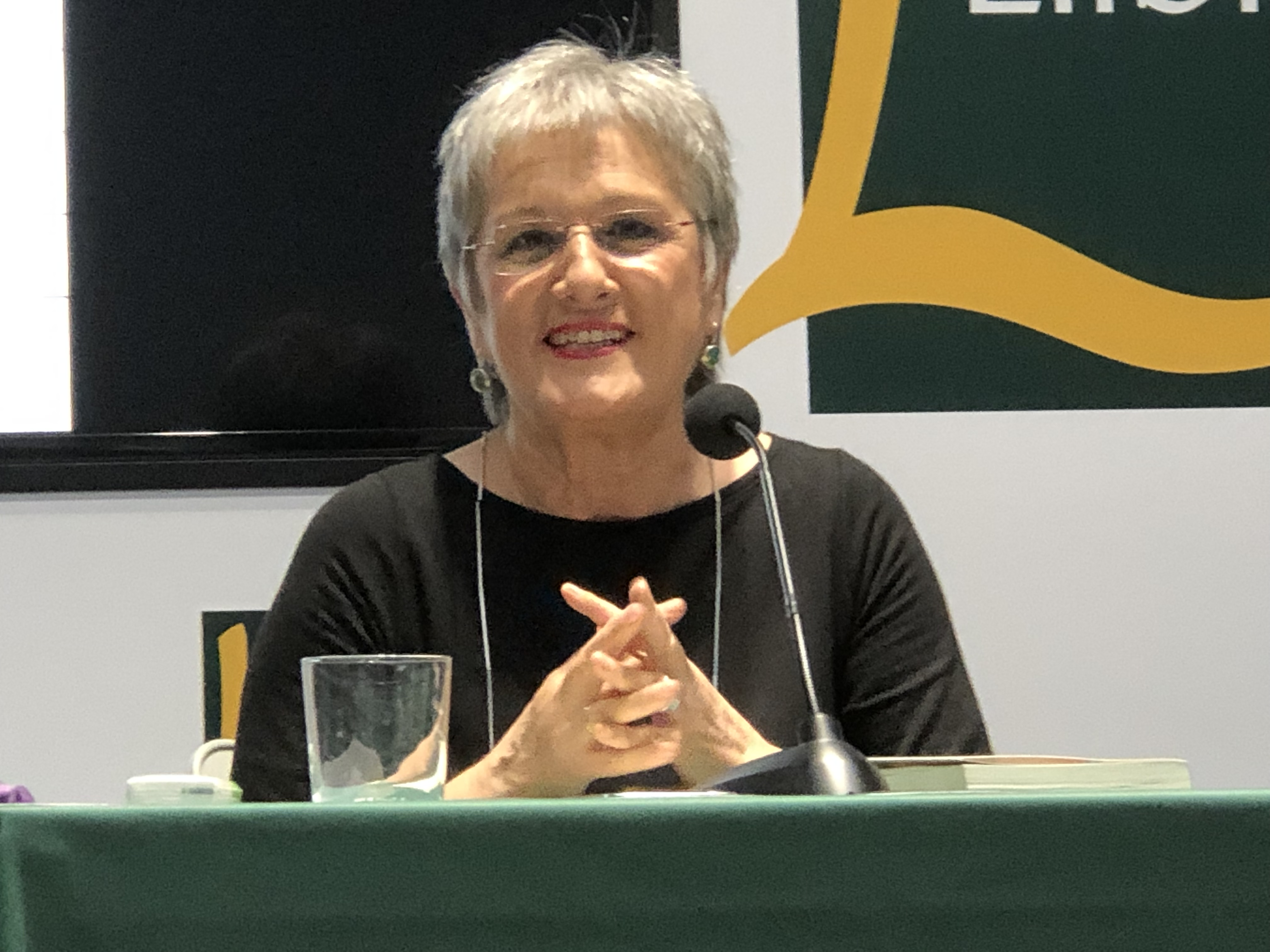 Presentación libro Obertura Republicana